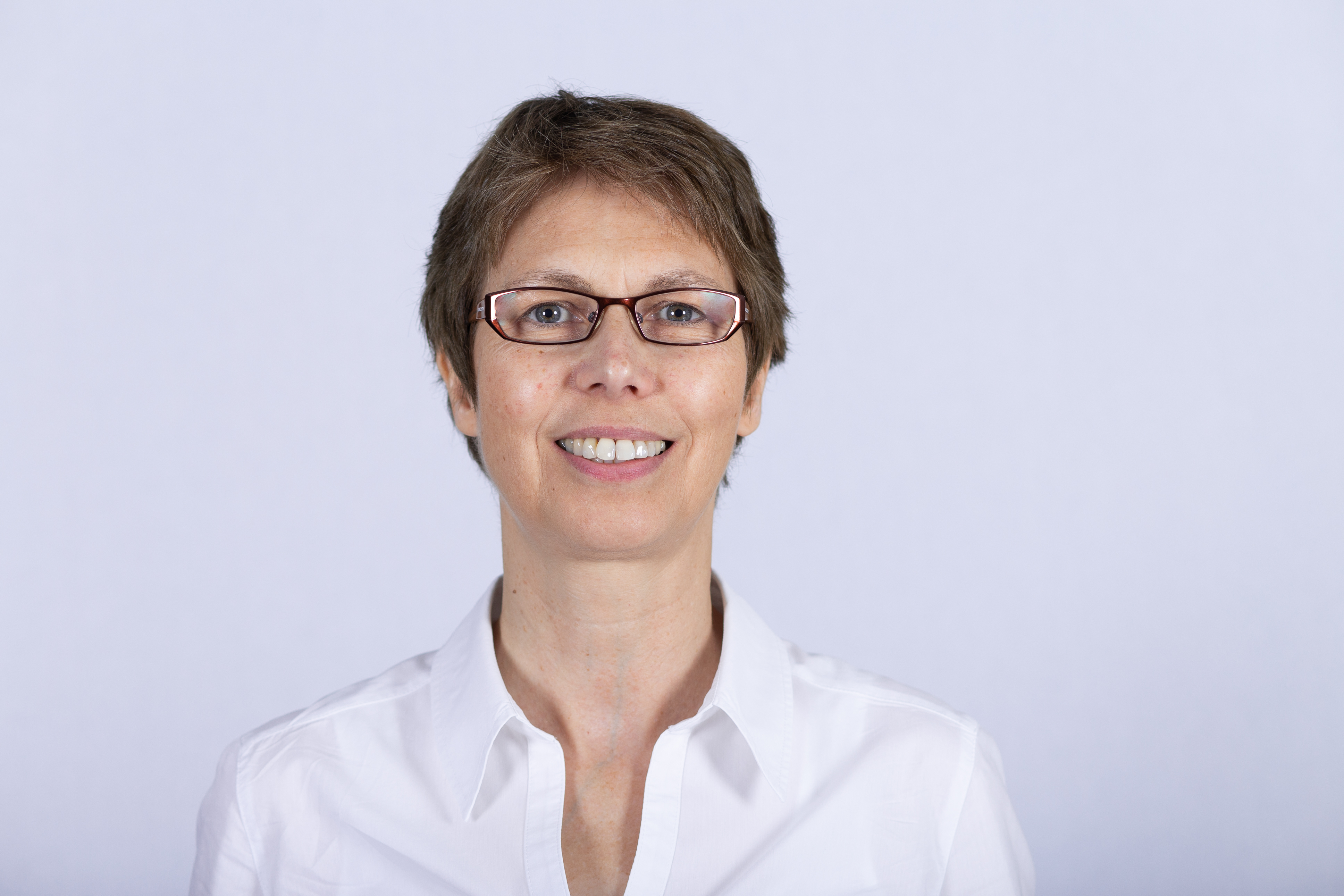 Dorothea Frederking, MdL Sachsen-Anhalt, B90/Grüne